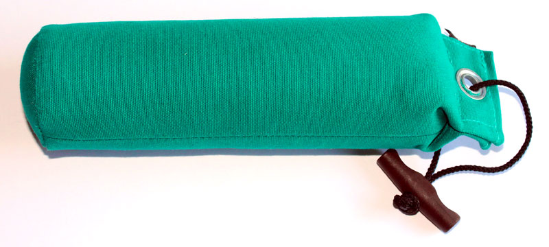 Dummy